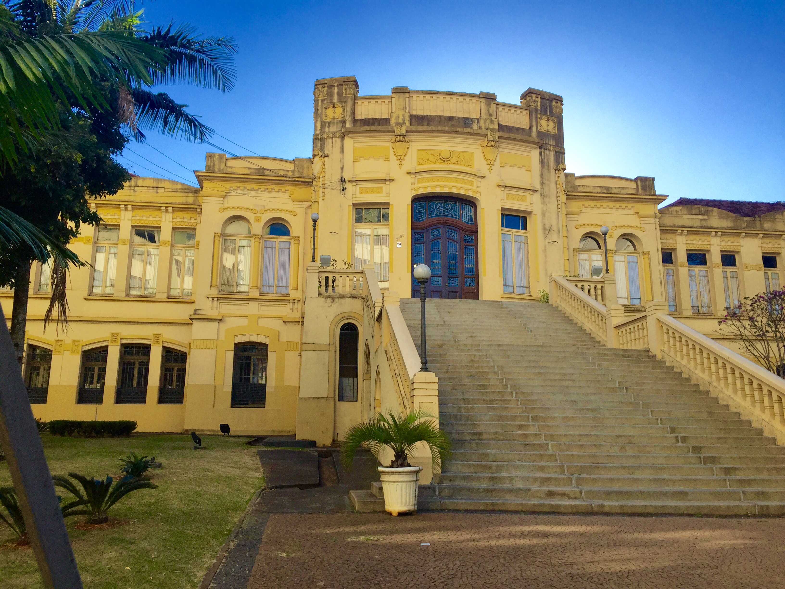 INSTITUTO DE EDUCAÇÃO DOUTOR ÁLVARO GUIÃO